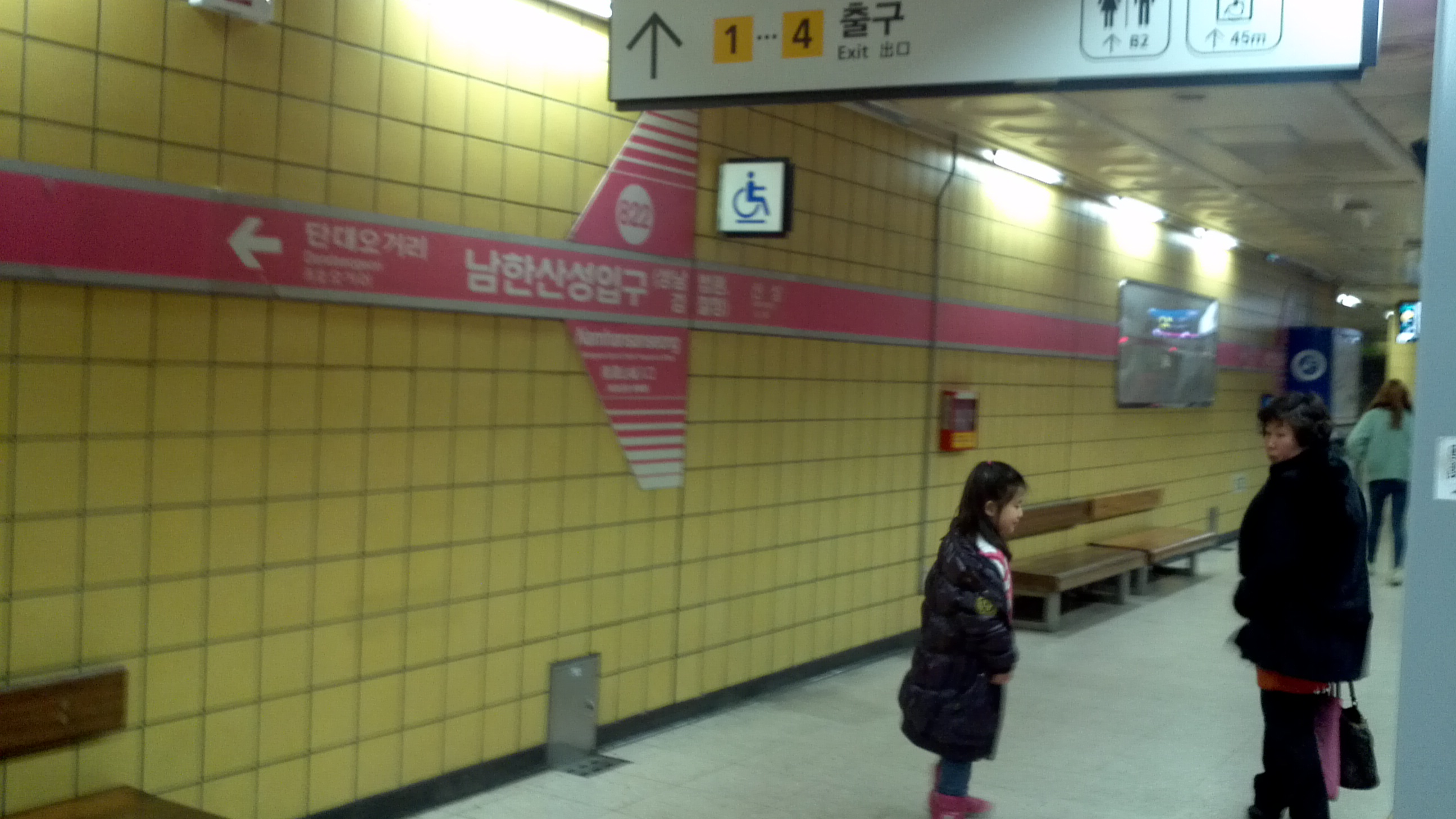 남한산성입구역 역명판